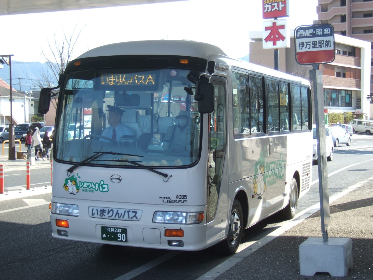 伊万里市コミュニティバス「いまりんバス」（伊万里駅前バス停にて）